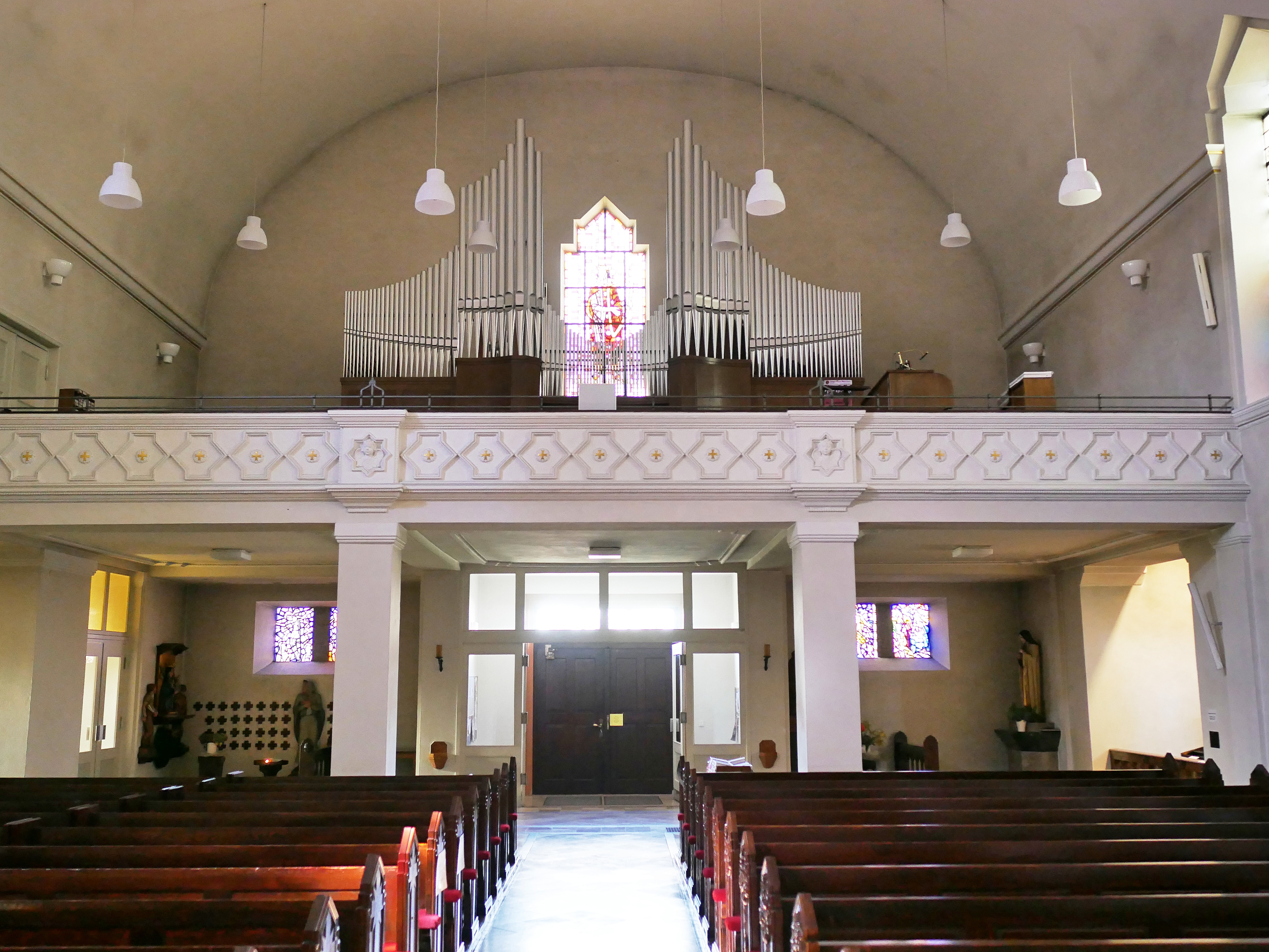 Erscheinung des Herrn (Gusenburg) - Orgel